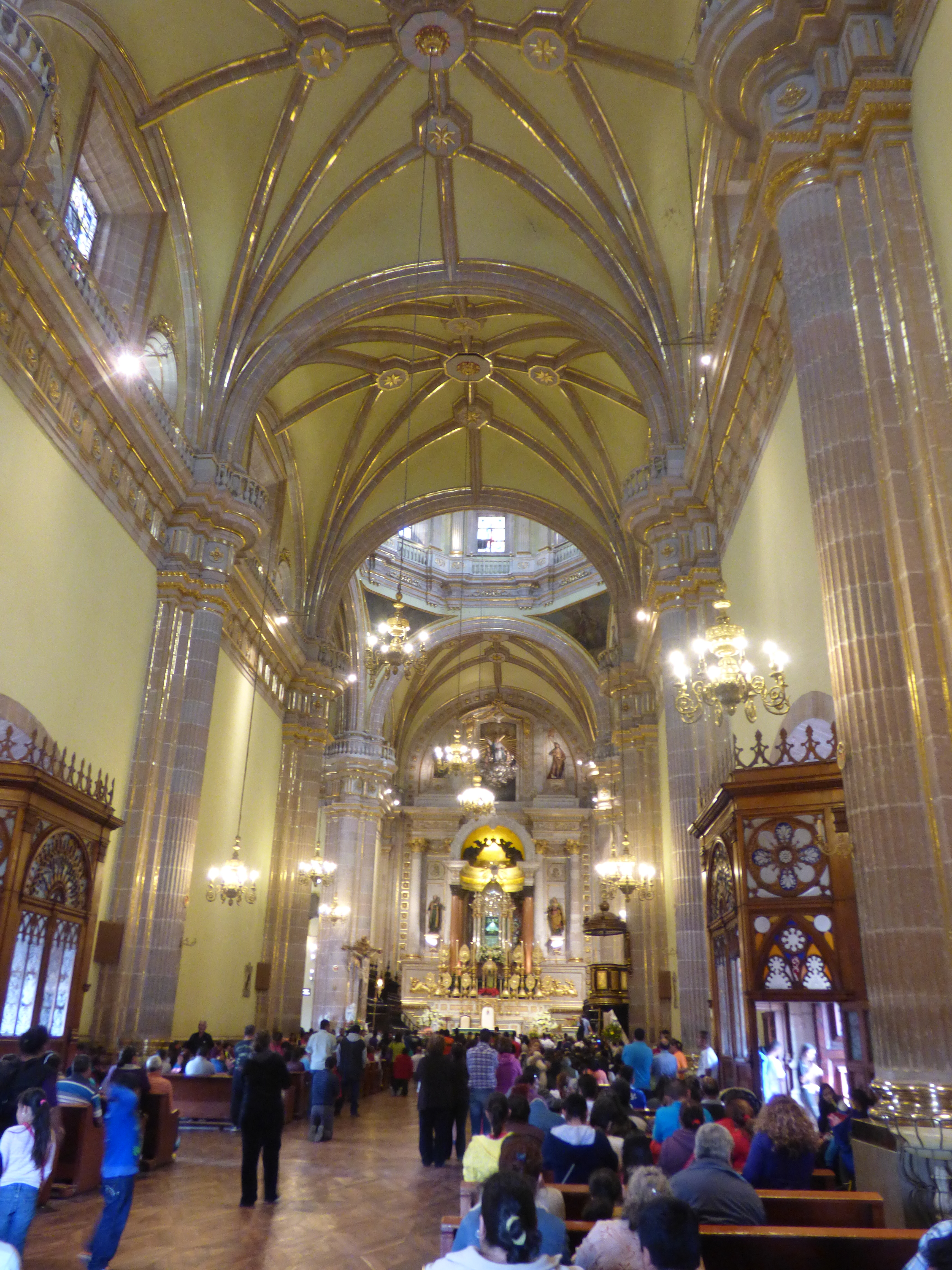 Virgen de San Juan de los Lagos, Jalisco